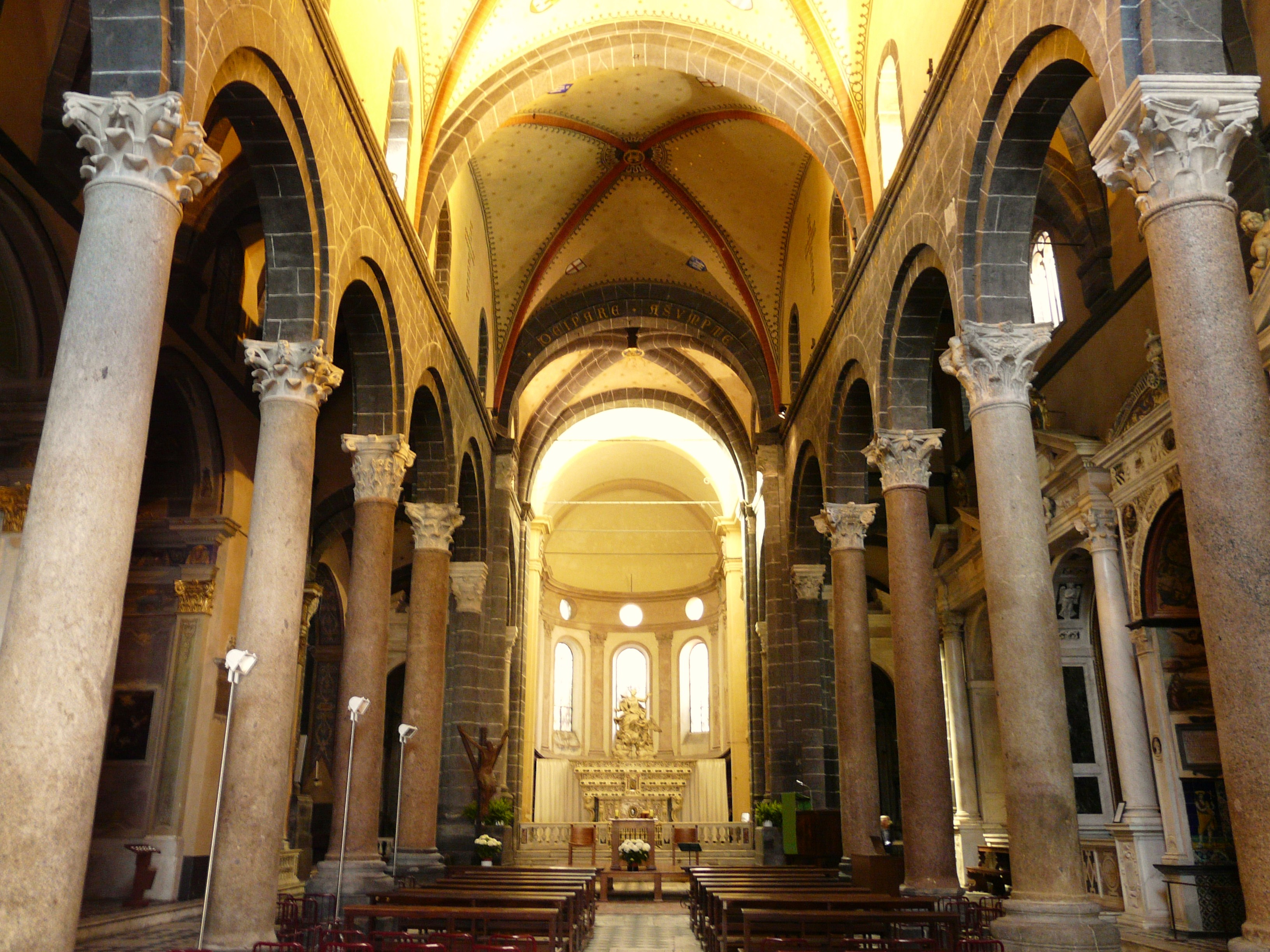 Chiesa di Santa Maria di Castello, Genova, Liguria, Italia